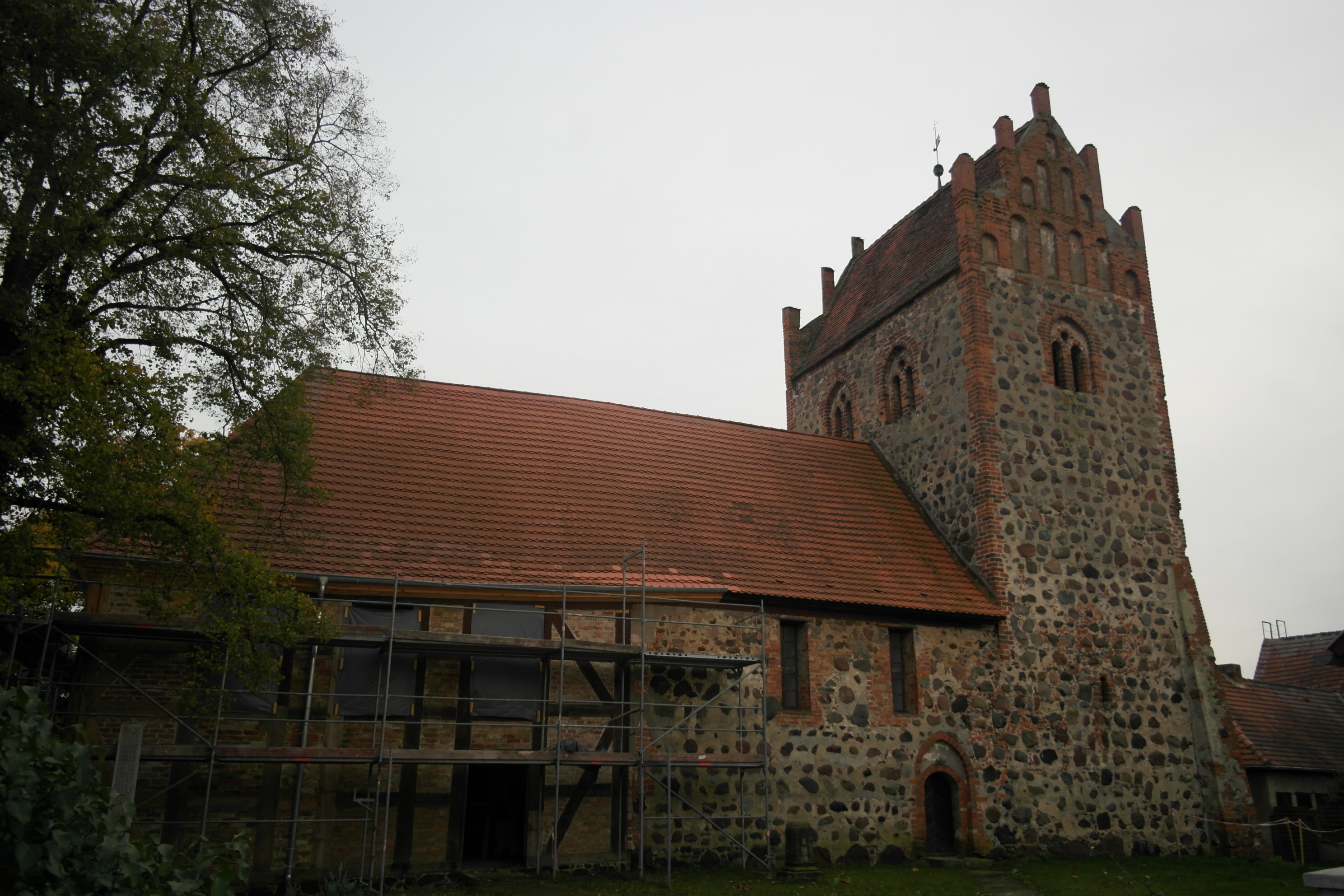 Kirche Wutike, denkmalgeschützt